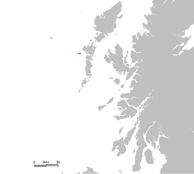 UK Monach.PNG (Scotland, Hebrides)